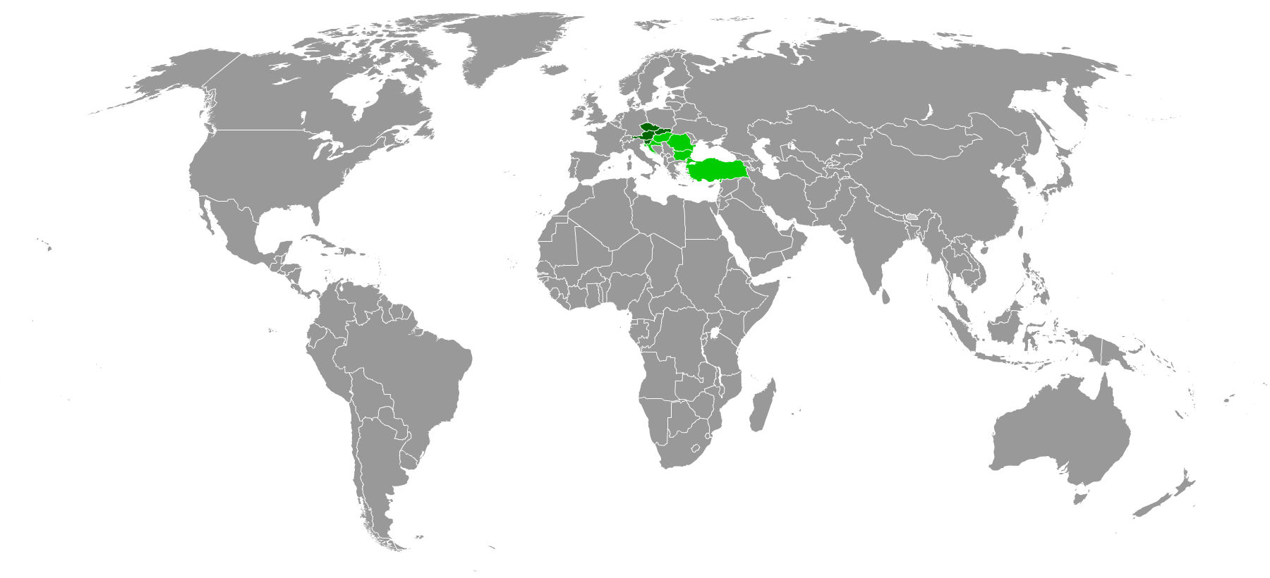 Státy, kde dříve působila společnost bauMax (světle zelená - do konce roku 2014; tmavě zelená - do konce roku 2016)